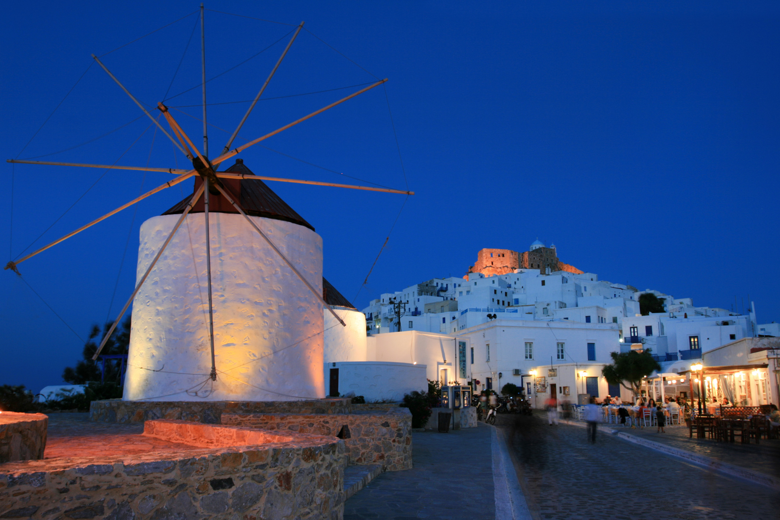 Κάστρο Αστυπάλαιας«Κάστρο Αστυπάλαιας»